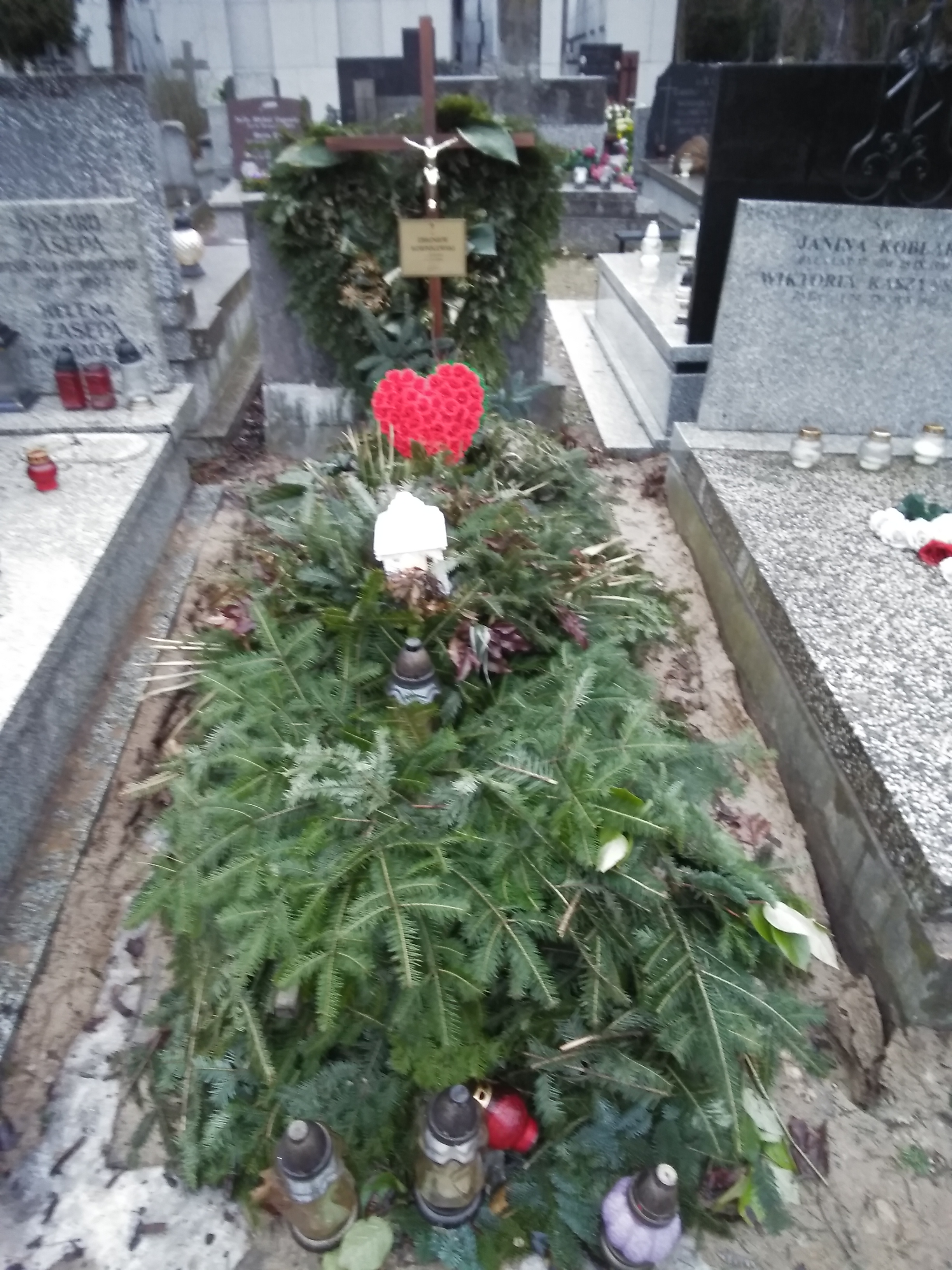 Grób Zbigniewa Korpolewskiego na Cmentarzu Wojskowym na Powązkach.